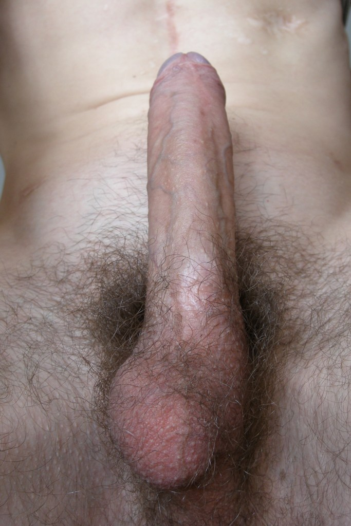 Крипторхизм.Одно яичко.